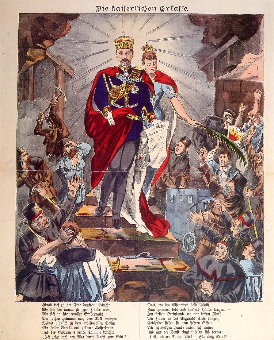 Die Kaiserlichen Erlasse (Wilhelm II.) Neuruppiner Bilderbogen (kolorierte Kreidelithographie 1890)